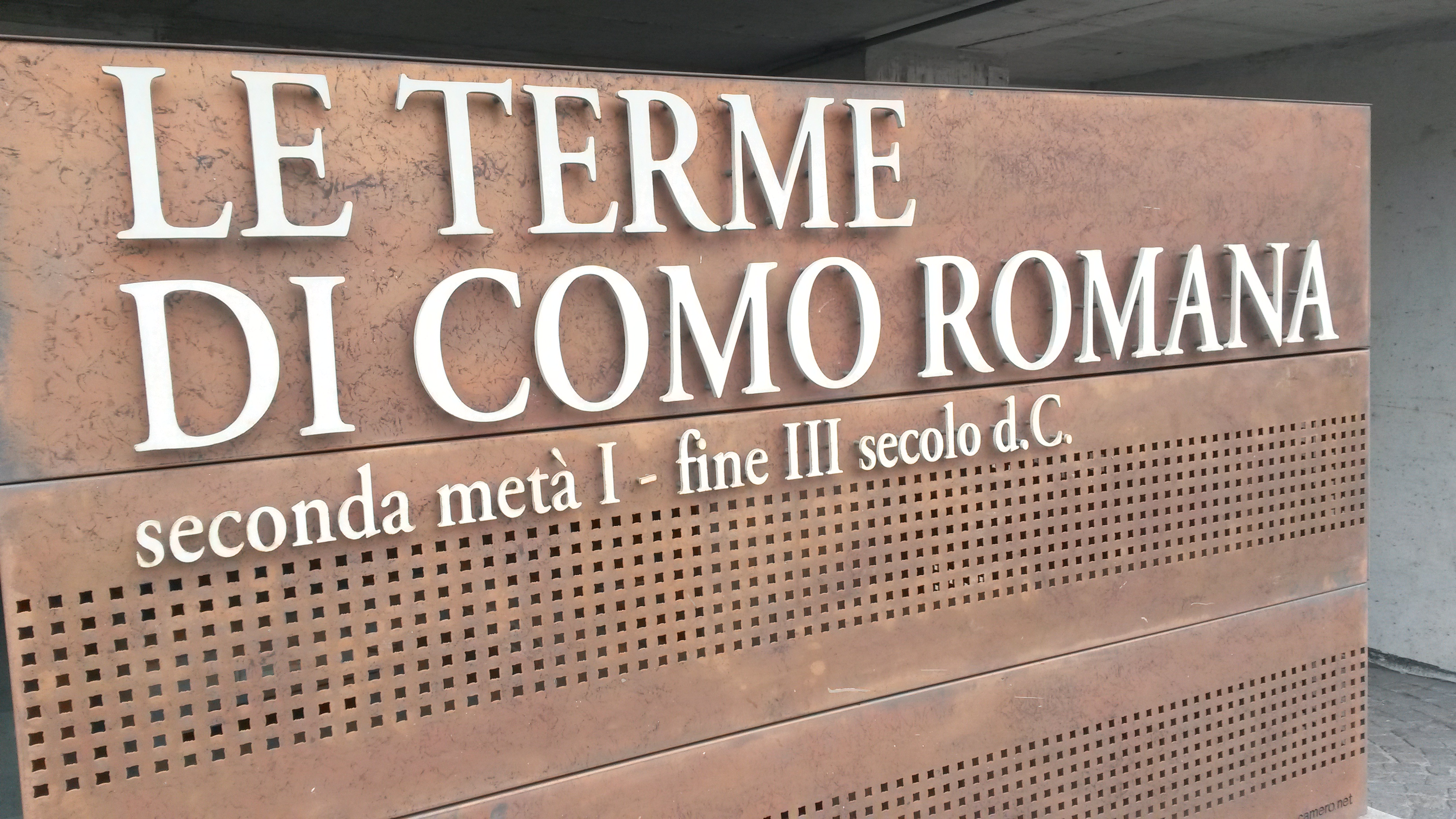 Terme di Epoca Romana, Como viale Lecco